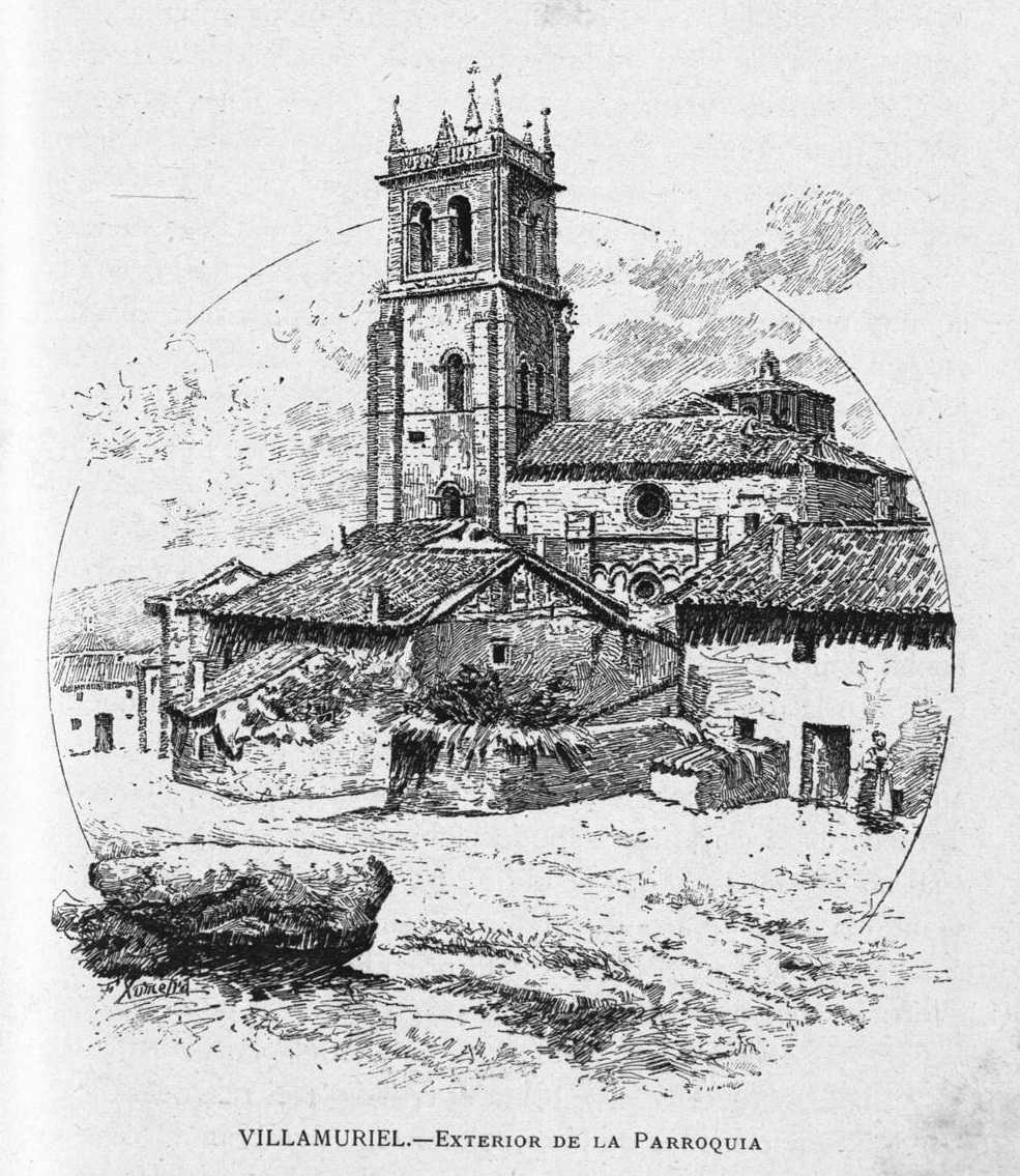 Villamuriel. Exterior de la parroquia.